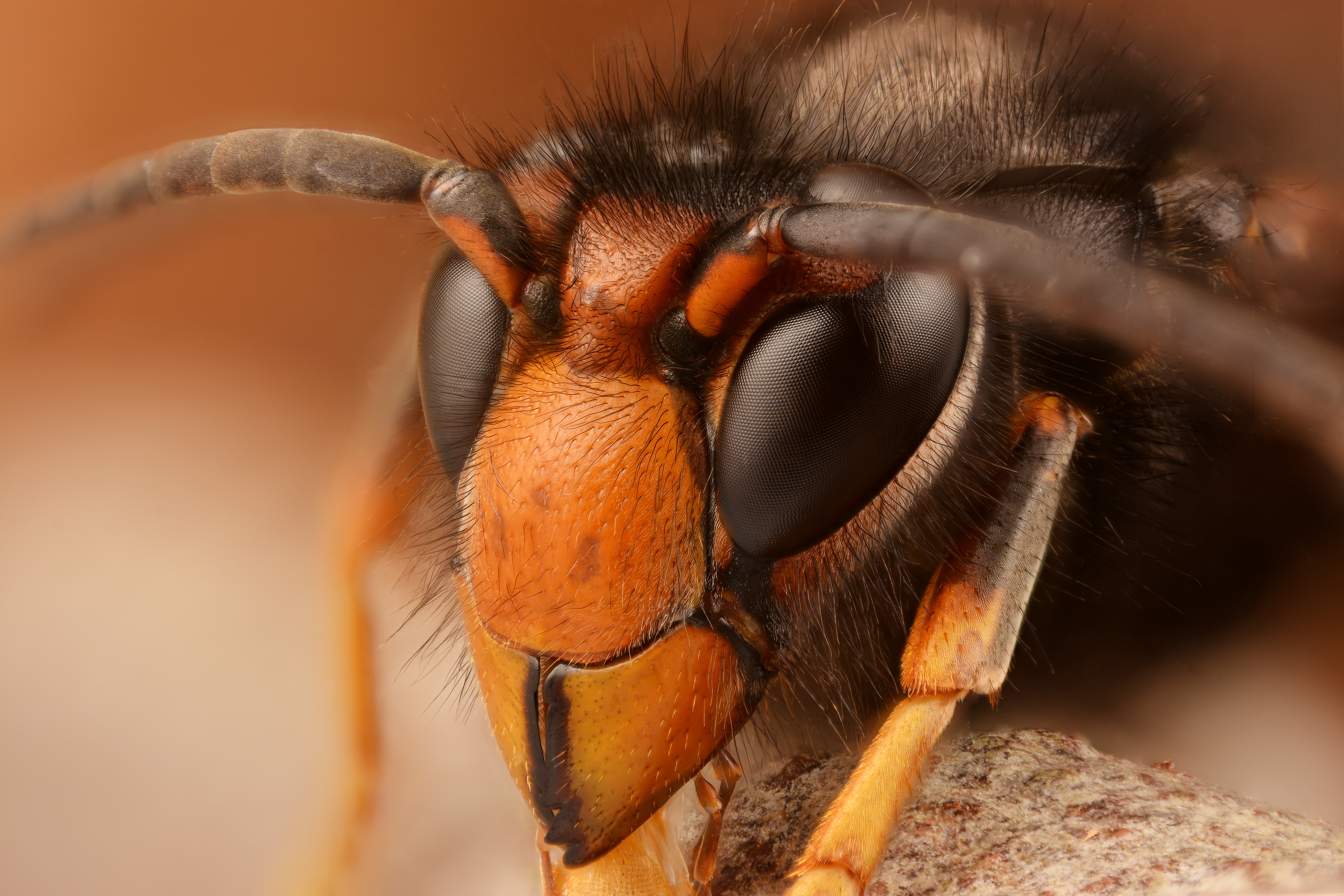 Male Asian hornet (Vespa velutina). Location: Guignies - Belgium